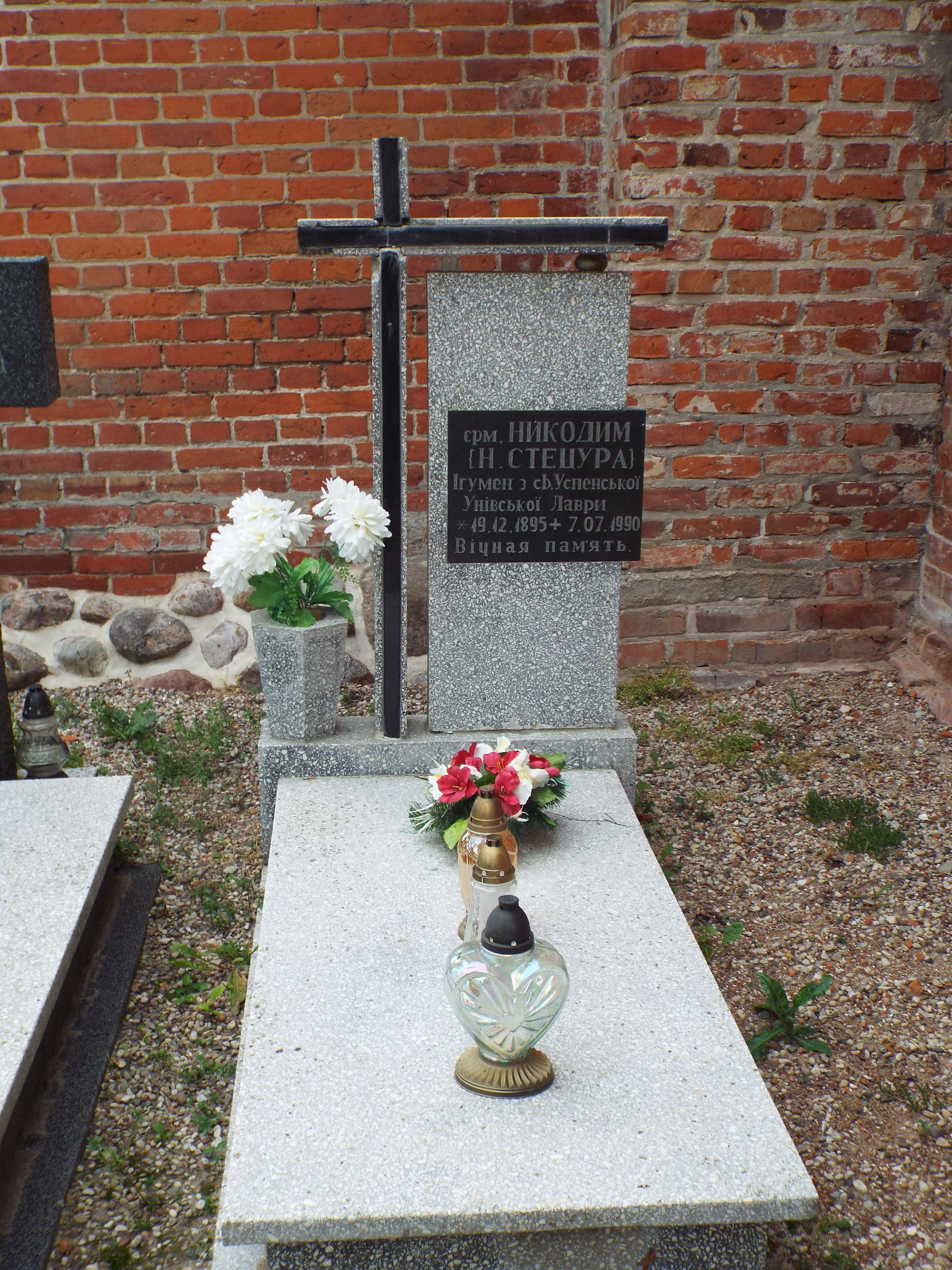 Могила ієромонаха Никодима (Н. Стецури) біля церкви св. Миколая в Желіхово-Циганку. Фото Івана Парнікози, 2019 р.